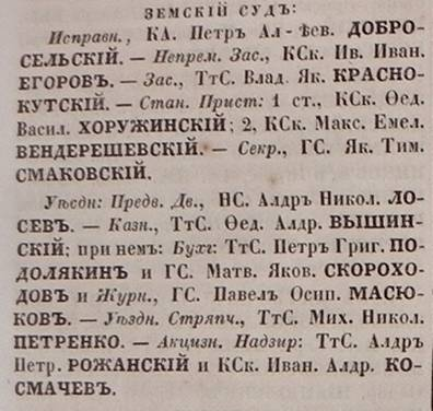 Михайло Петренко, про Лебединський земський суд з адрес-календарю